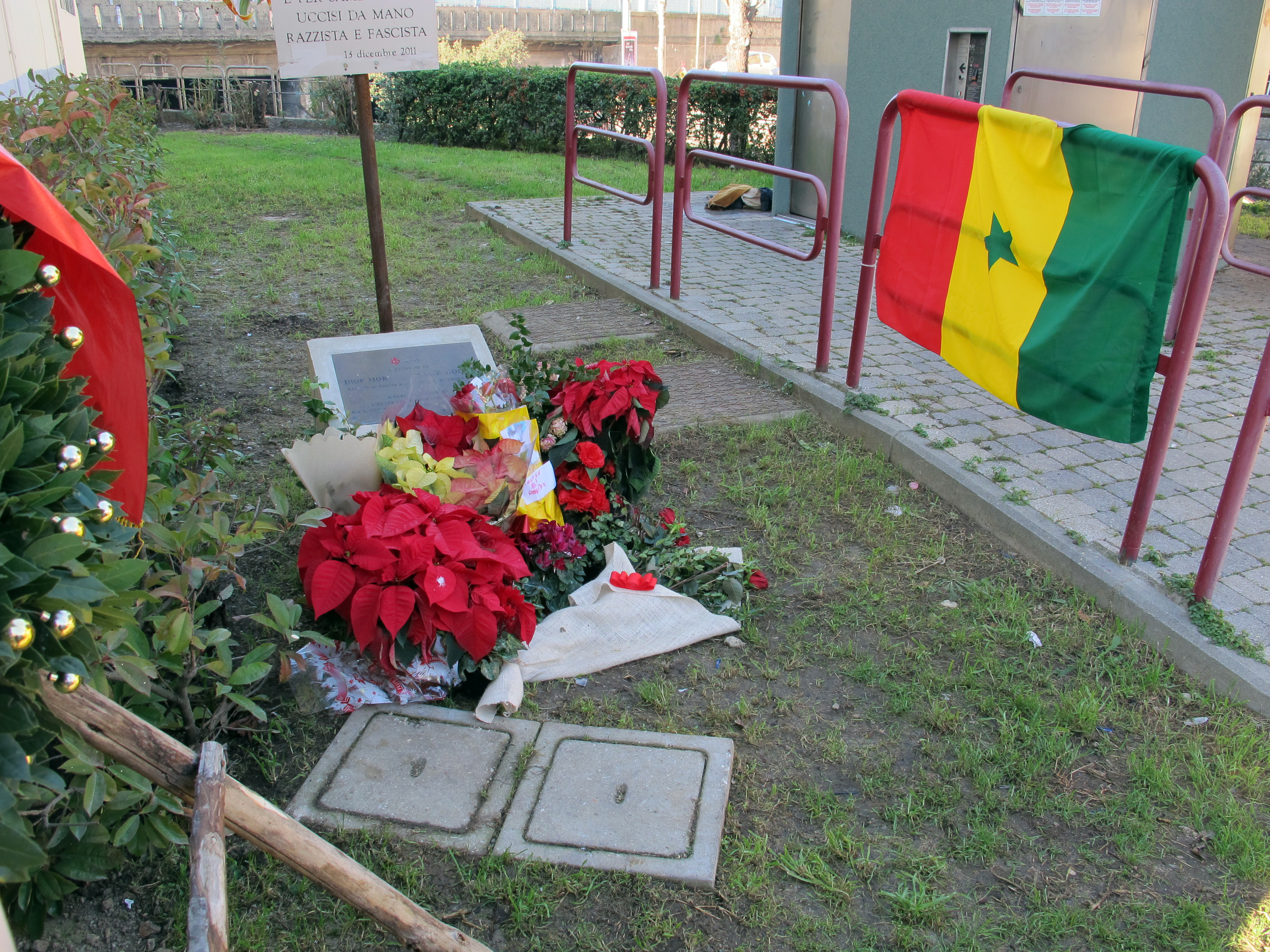 Piazza dalmazia, ricordo delle uccisioni del 13 dicembre 2011, 03.JPG